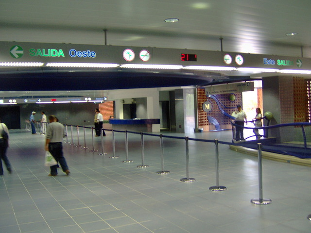 Estacion monumental del metro de valencia, venezuela